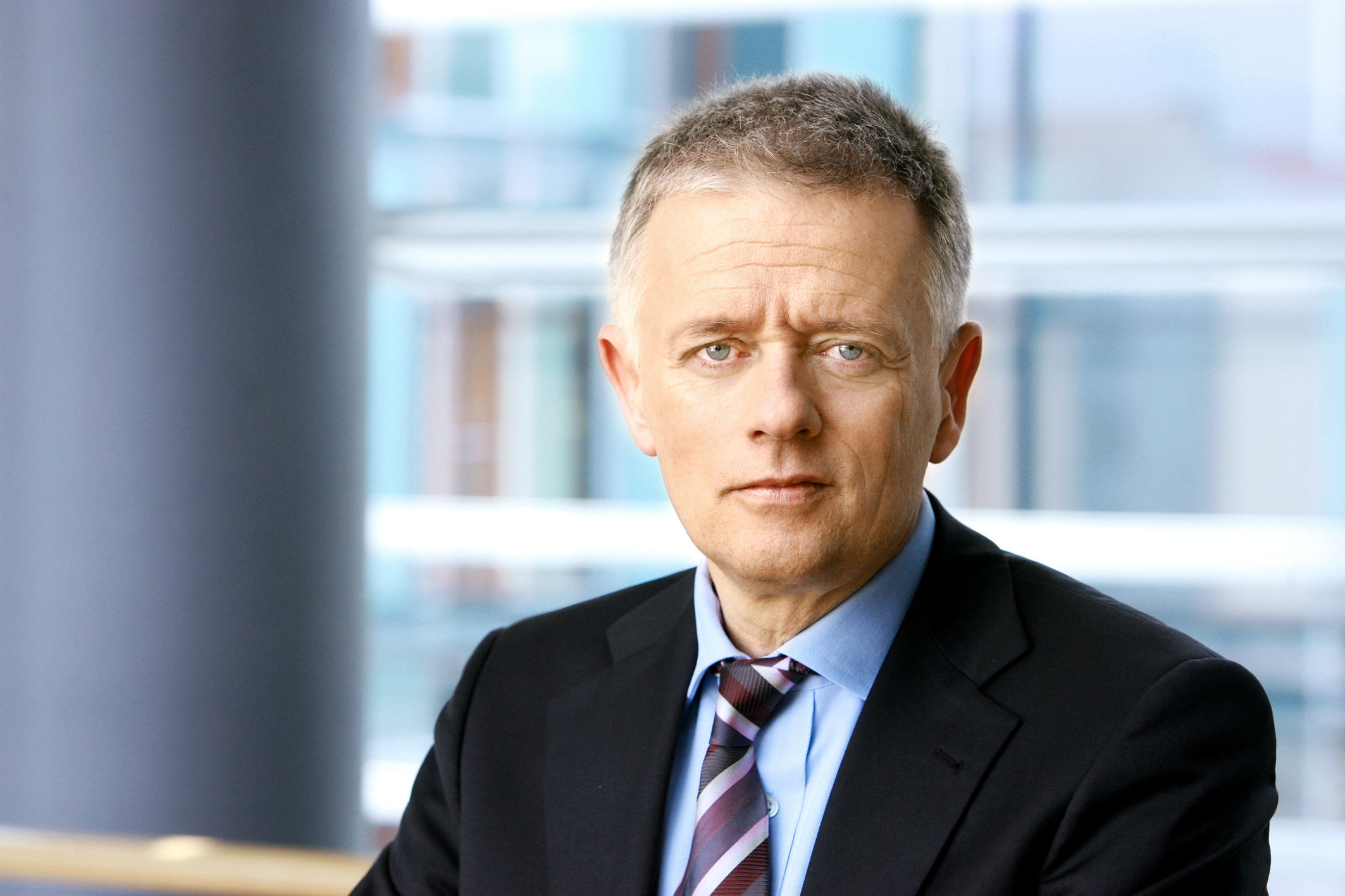 Foto von Fritz Kuhn, Bundestagsfraktion Bündnis 90/Die Grünen